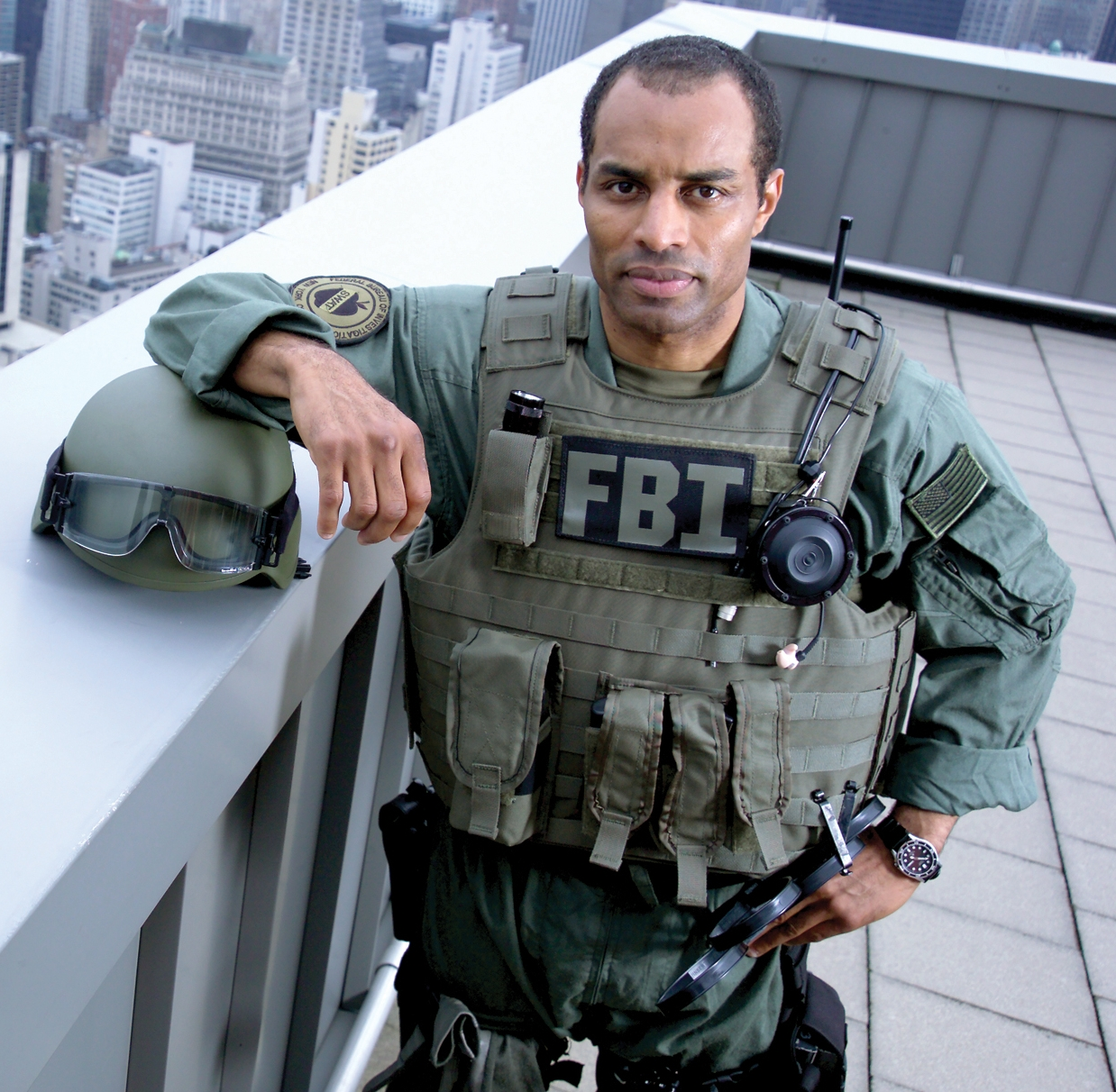 FBI SWAT agent.